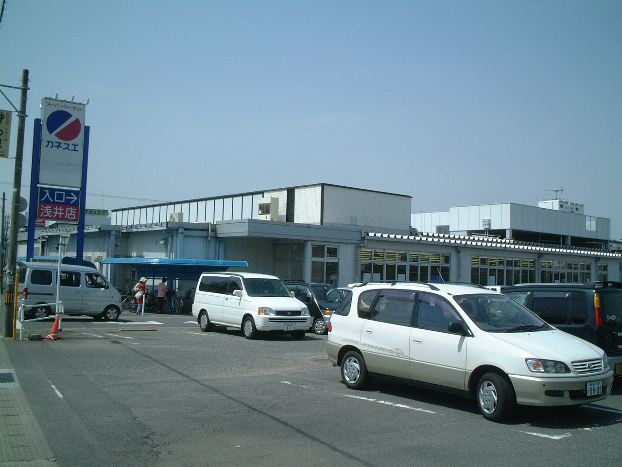 カネスエ浅井店の画像